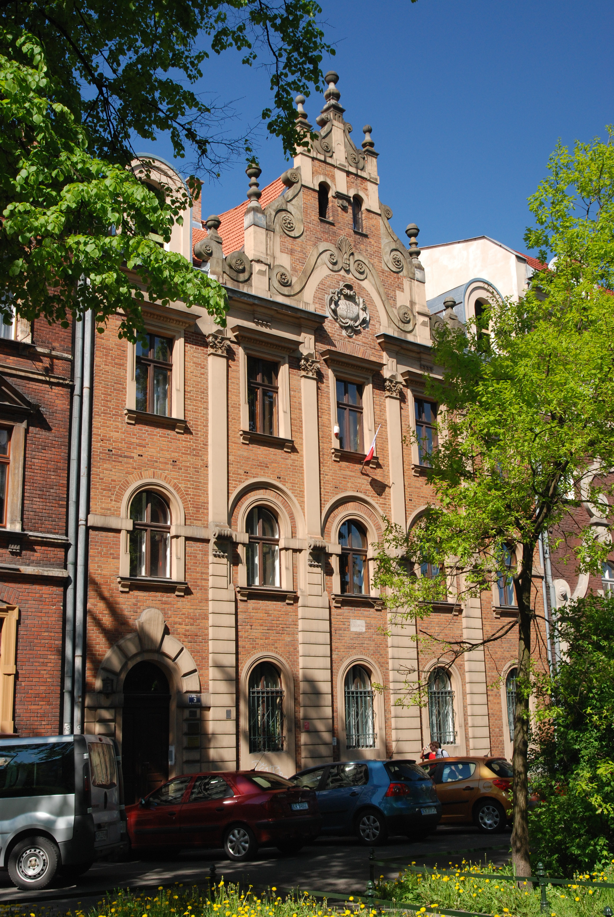 Dom proj. Teodora Talowskiego, ul. Retoryka 3, Kraków